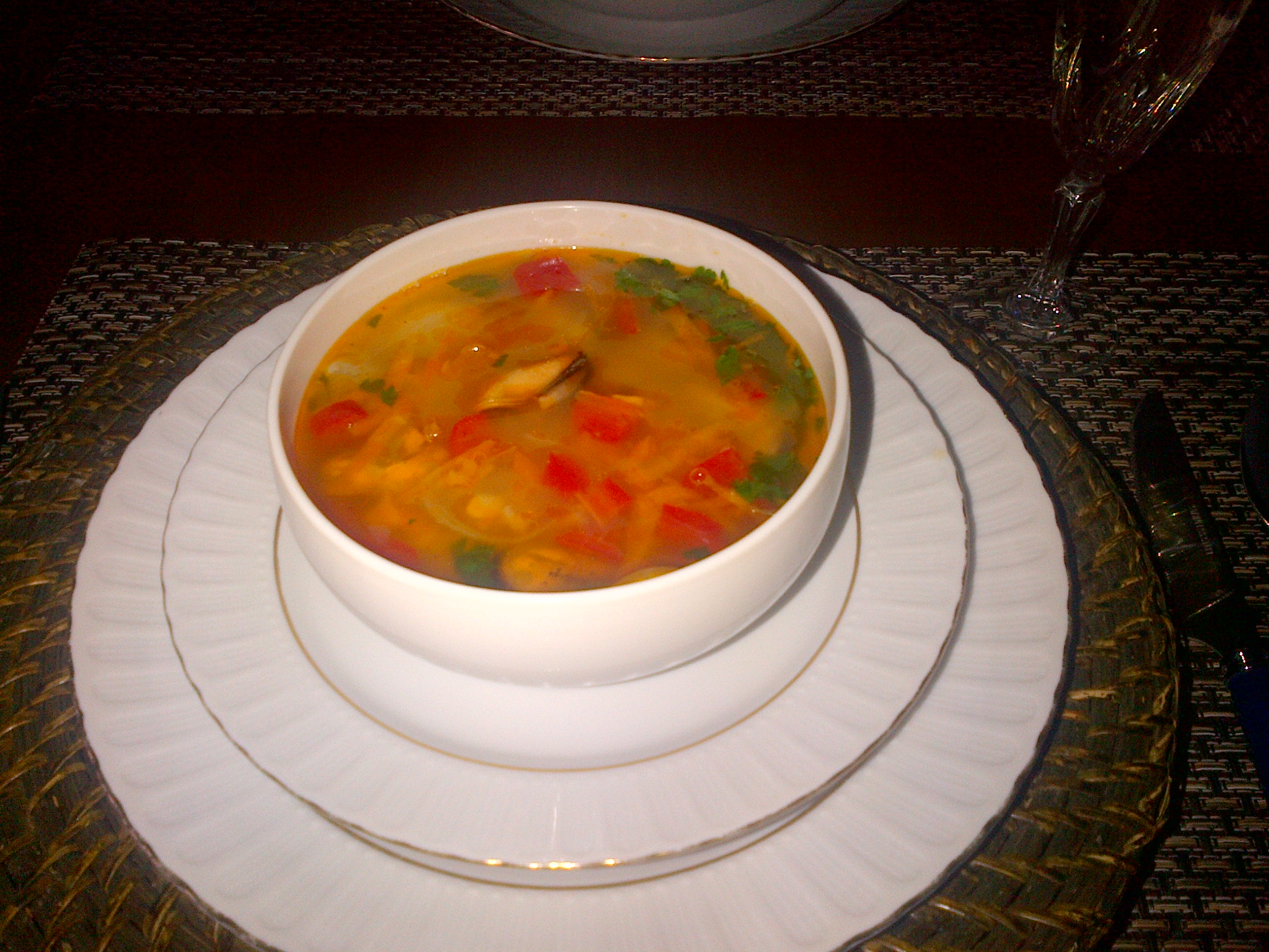 Sopa de "choritos" (mejillones) de la cocina chilena.